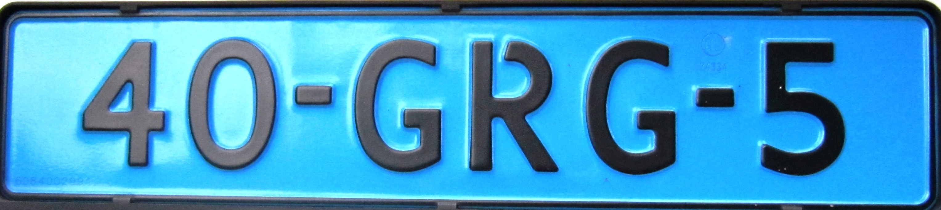 Nederand taxi kenteken licht blauw